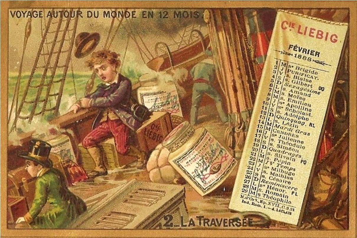 Chromolithographie de la marque Liebig, entreprise française, appartenant au groupe américain Campbell Soup Company. Thème : voyage autour du monde en douze mois. La traversée, février 1888.